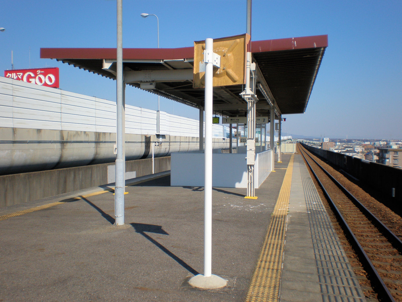 愛知県春日井市にある東海交通事業味美駅